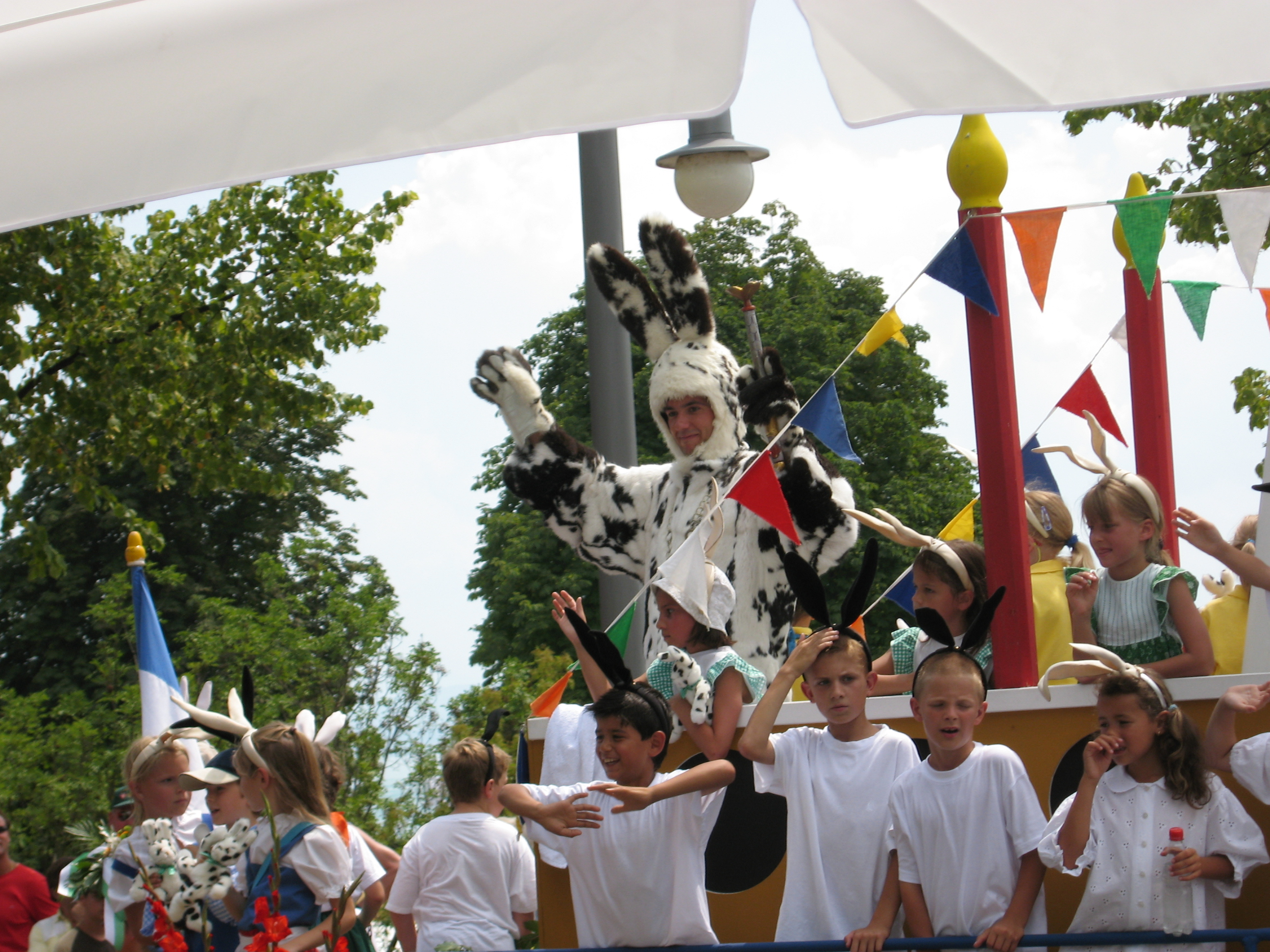 Seehasen-Festwagen - Seehasenfest - 2006 - Friedrichshafen